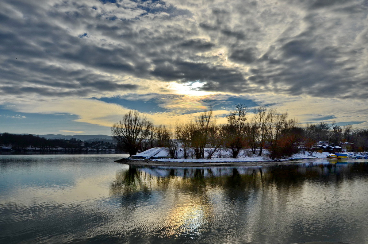 Ribarac Oblaci Ово је фотографија заштићеног природног добра у Србији под шифром: СП133 This is a a photo of a natural area in Serbia with ID: СП133